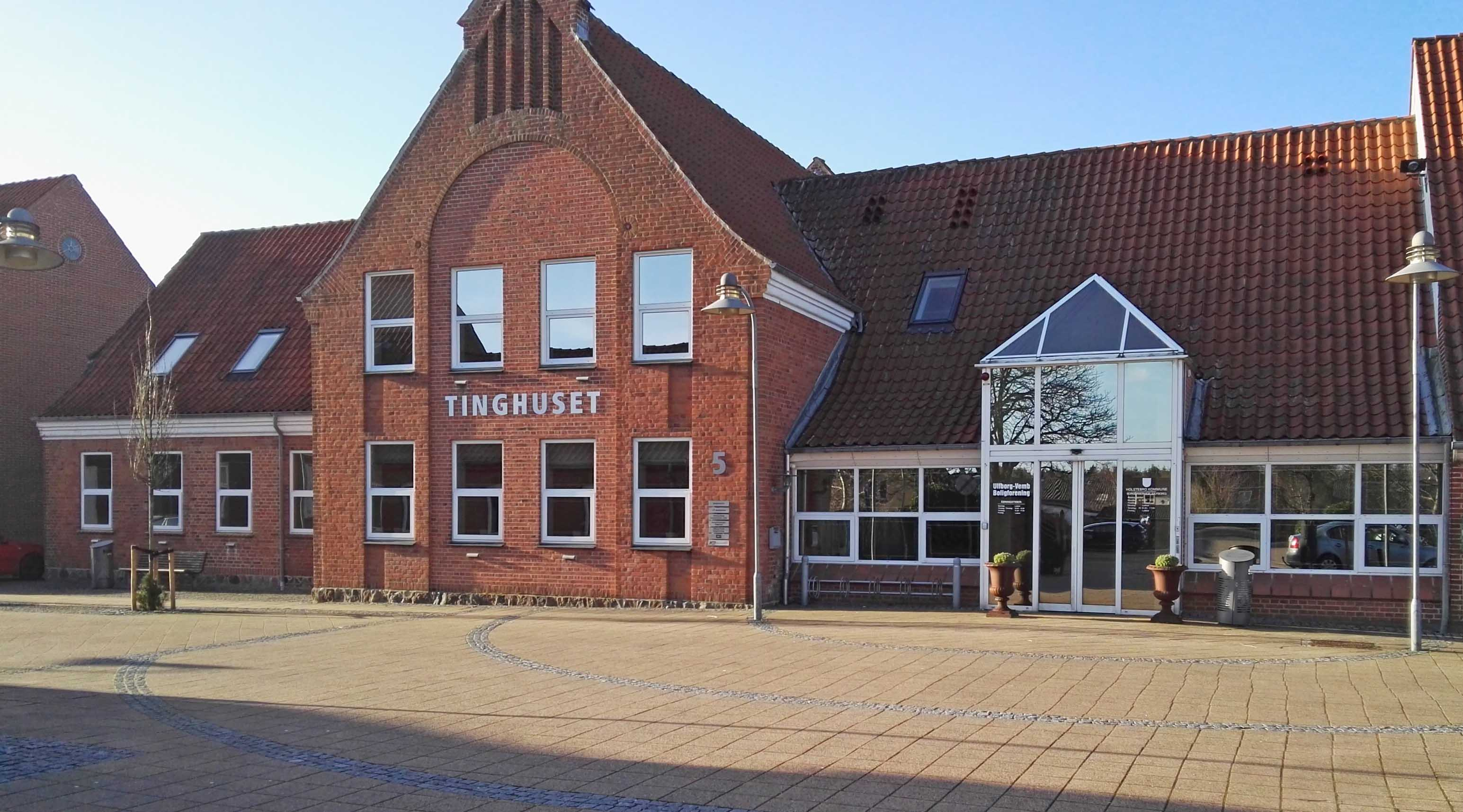 Den tidligere Ulfborg-Vemb Kommunes rådhus på Tingvej 5 i Ulfborg